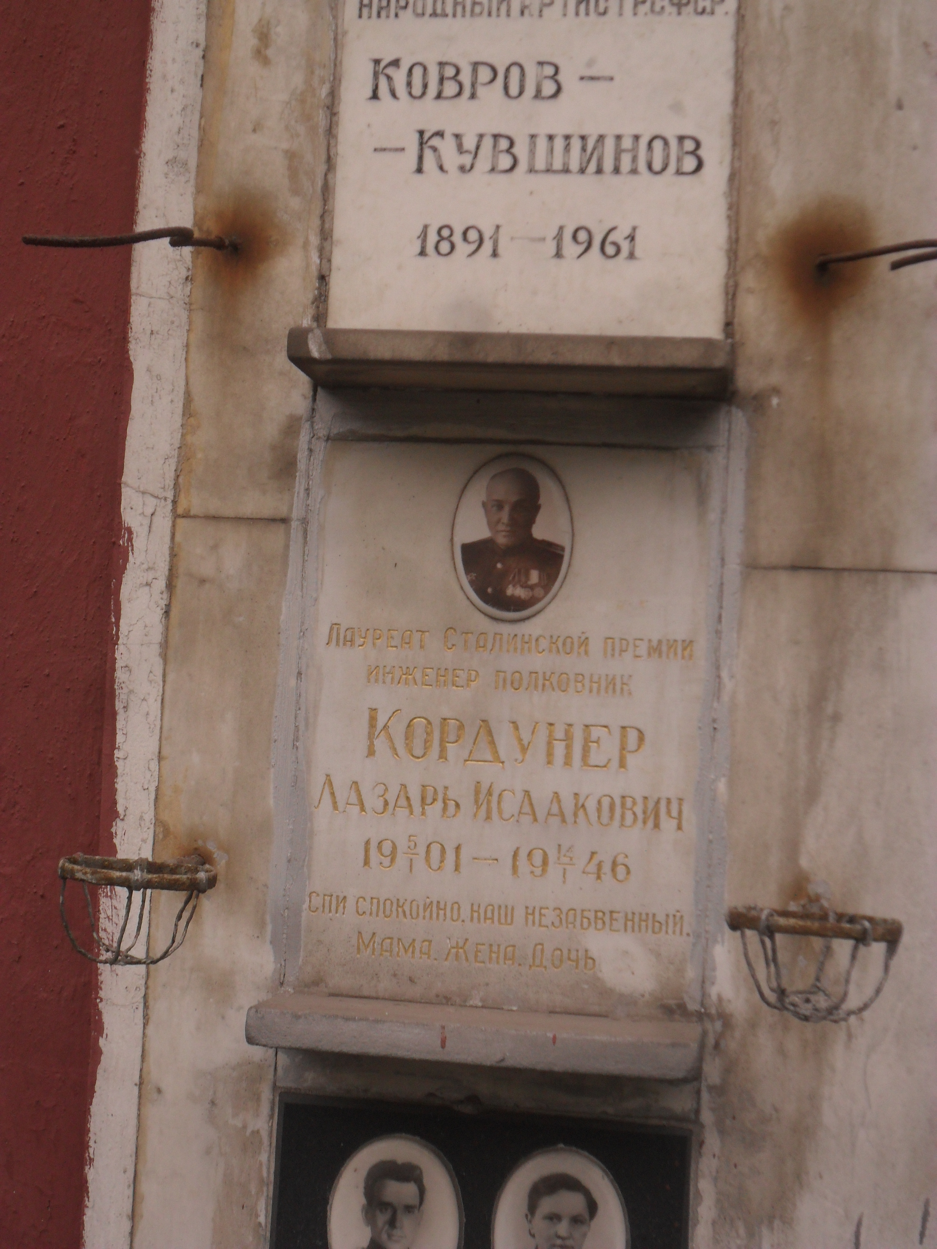 Плита колумбария инженера-механика Лазаря Кордунера на Новодевичьем кладбище Москвы.